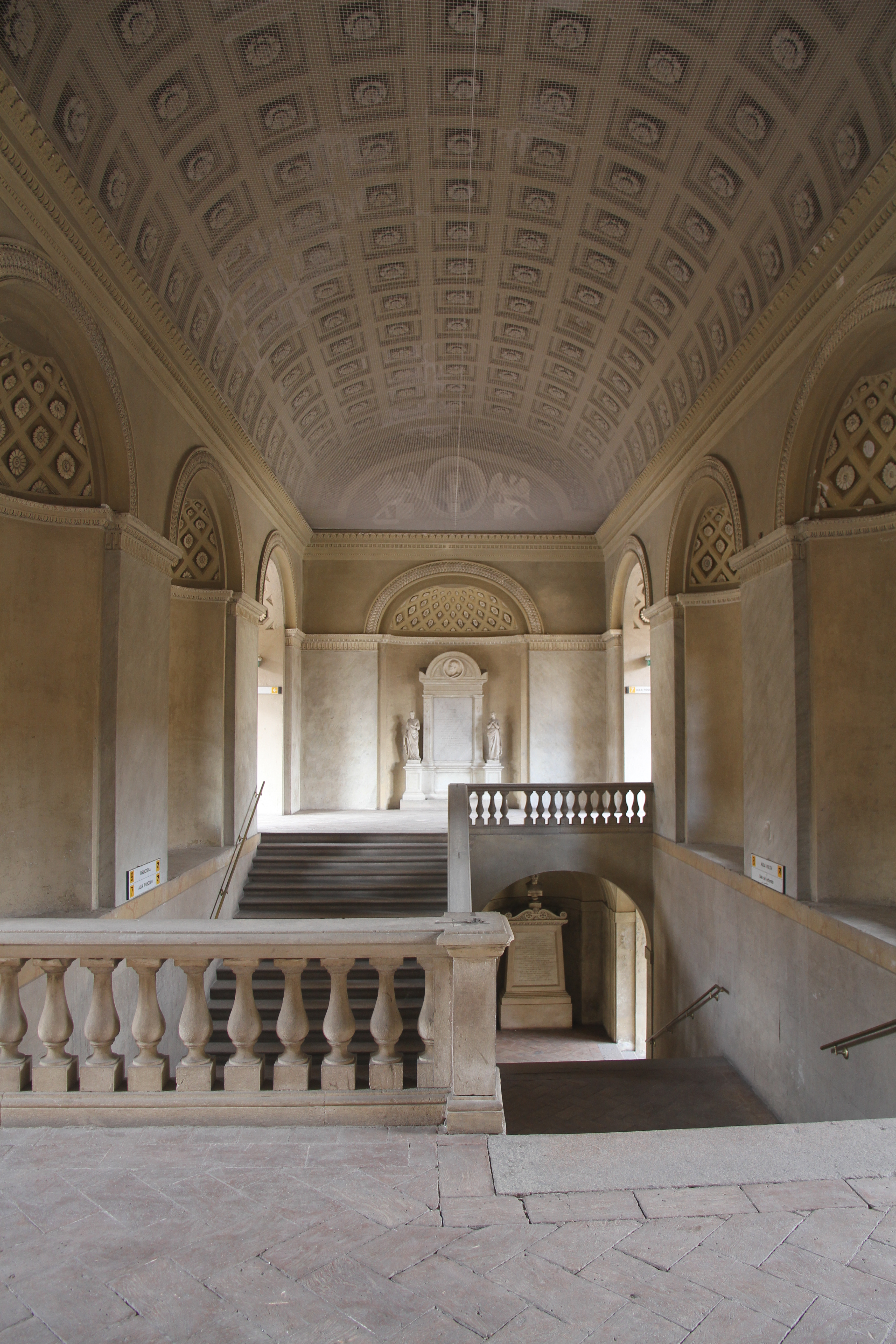 Scalone monumentale dell'Università di Pavia progettato dall'arch. Giuseppe Marchesi